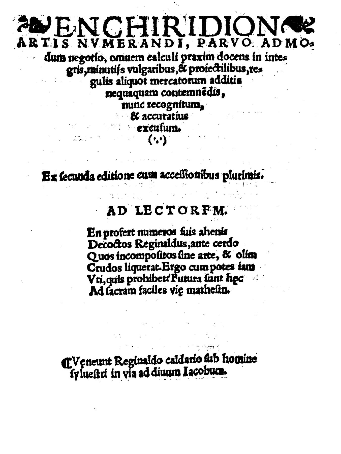 Enchiridion artis numerandi, parvo admodum negotio, omnem calculi praxim docens in integris, minutijs vulgaribus & proiectilibus, regulis aliquot mercatorum additis, nequaquam contemnendis, nunc recognitum, & accuratius excusum. - Ex secunda editione cum accessionibus plurimis. - Lutetiae : Veneunt Reginaldo caldario sub homine syluestri in via ad diuum Iacobum, [s. d.] (Mandabat suis typis Joannes Bignon calchographus, impensis honesti viri Reginaldi Chauldière, Lutetiae. anno a salute nostra 1535. idus septembris). - [26] c. ; 4º .